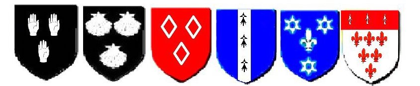 Blason des familles propriétaires du château de Lémo